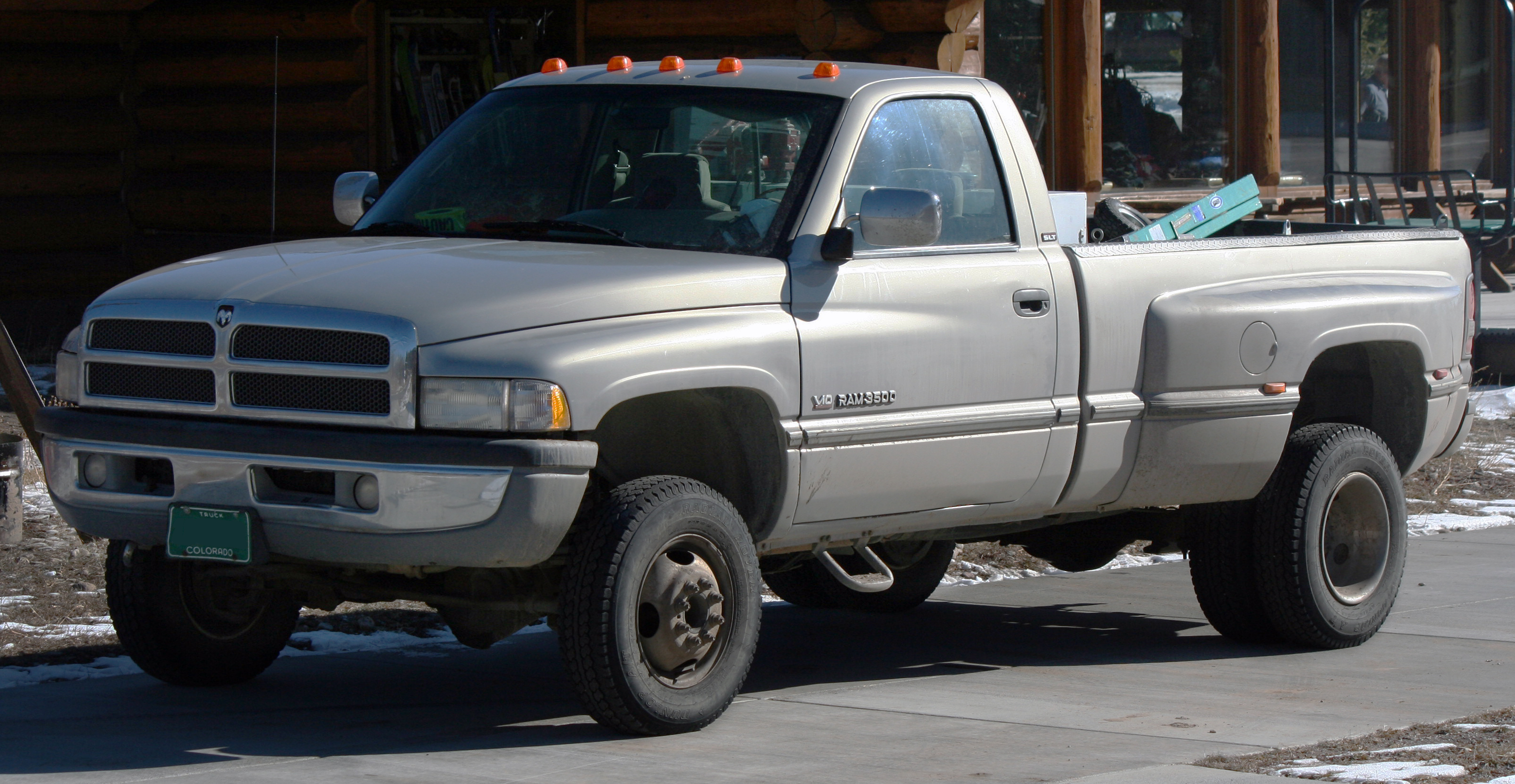 Dodge Ram V10 3500 "duallie"